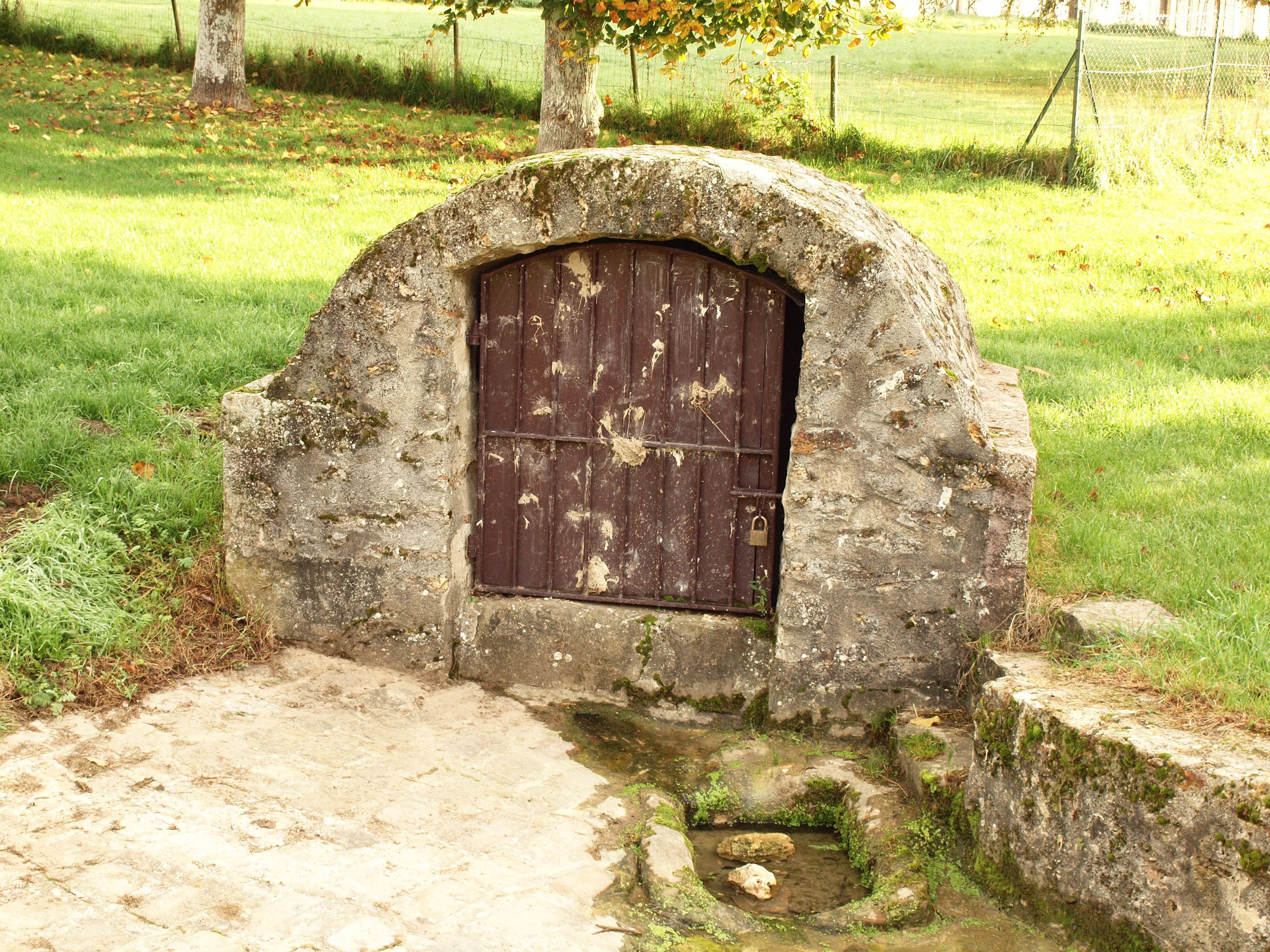 Bernay-Vilbert (Seine(er-Marne, Marne) ; bourg de Vilbert